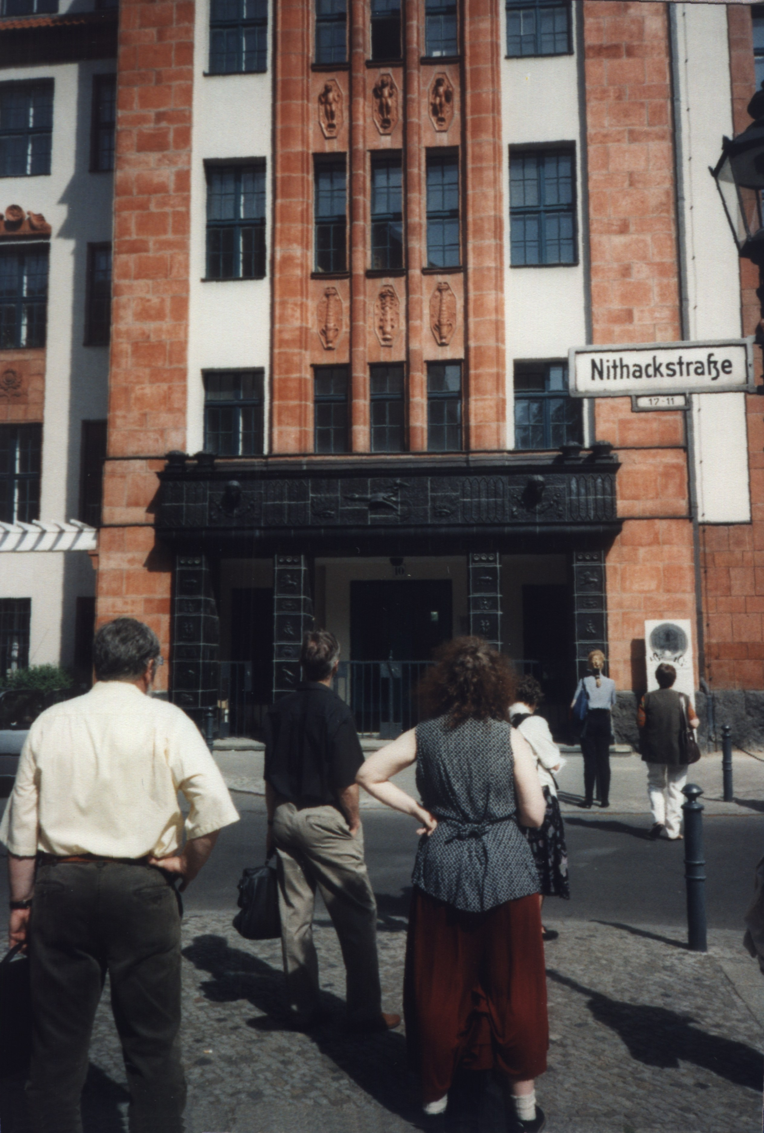 ehemalige Gemeindeschule in Charlottenburg mit Bildhauerschmuck von Ludwig Isenbeck